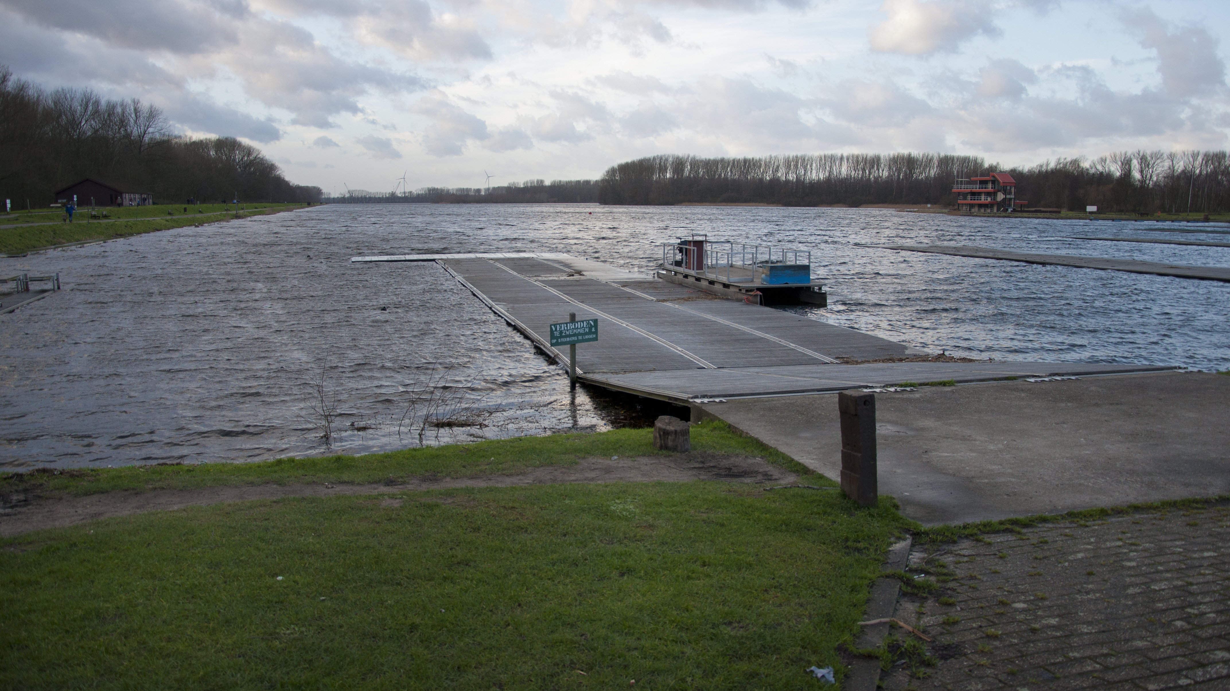 Hazewinkel (watersportbaan) te Willebroek, België